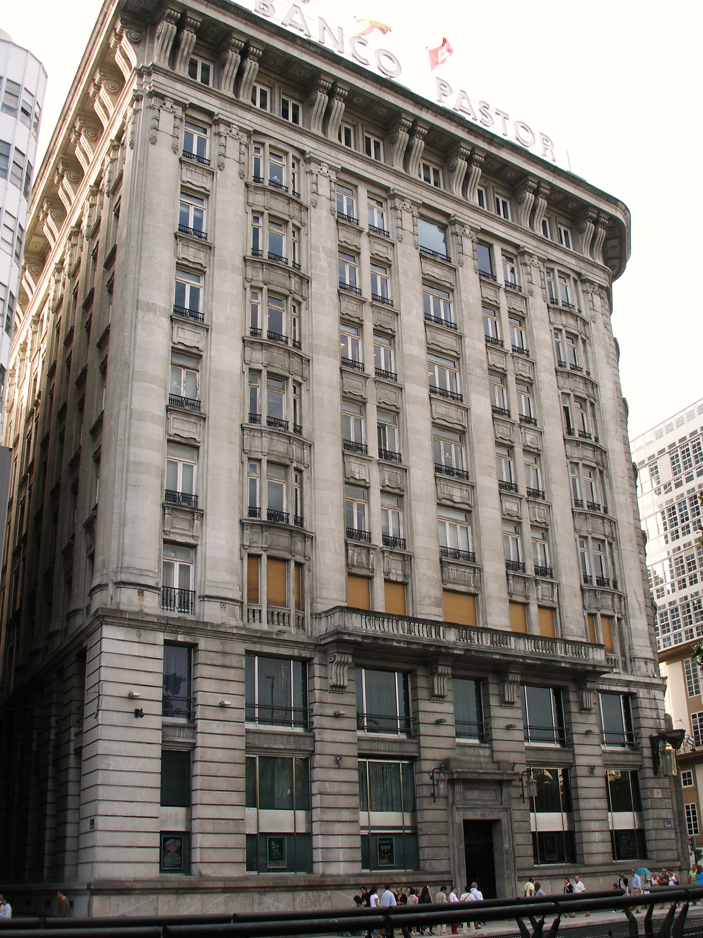 El edificio del Banco Pastor, construido en los años 20, llegó a ser en su época el más alto de España